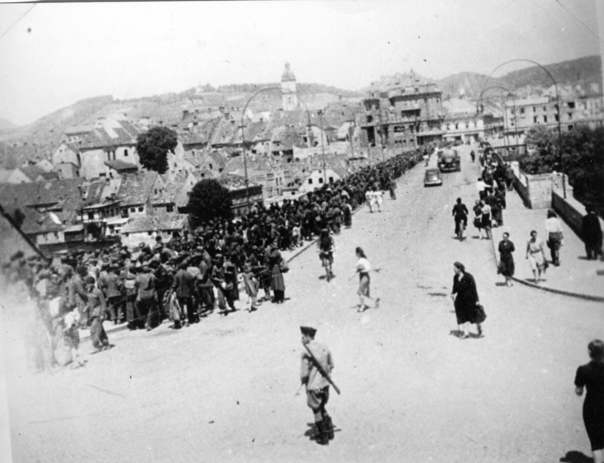 Zajeti Nemci in Ustaši na poti skozi Maribor.